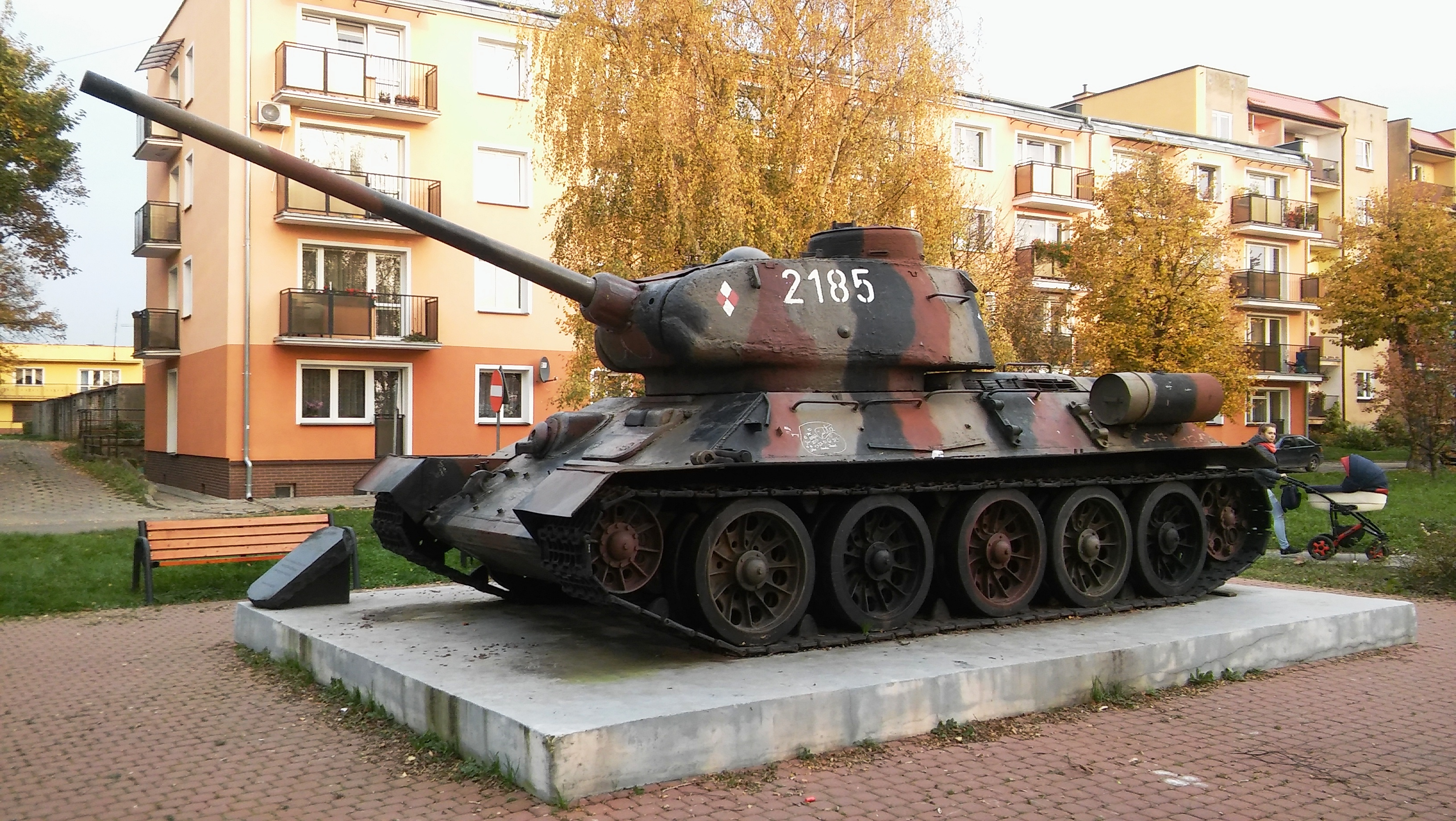 Czołg 2185 T34 85 stojący na pl. Grunwaldu w Braniewie